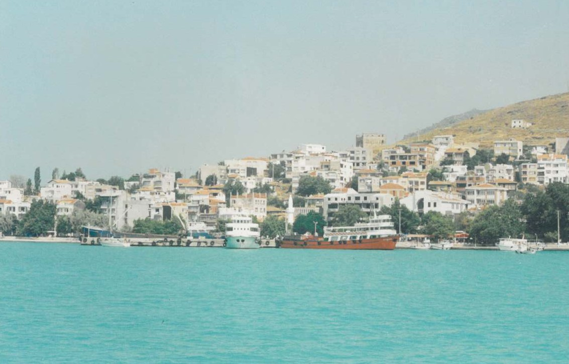 Avşa-Erdek